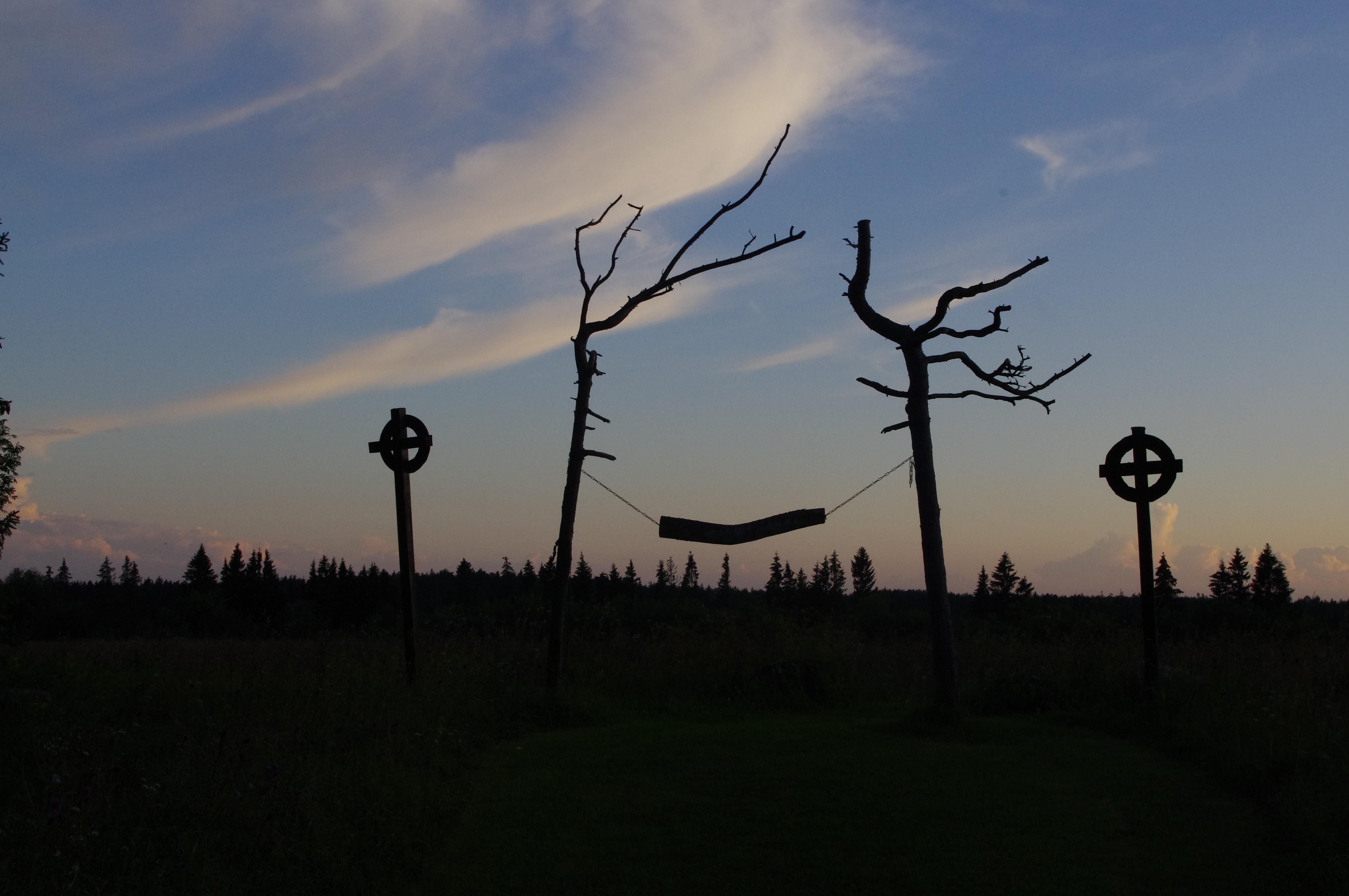 Kultusekivi